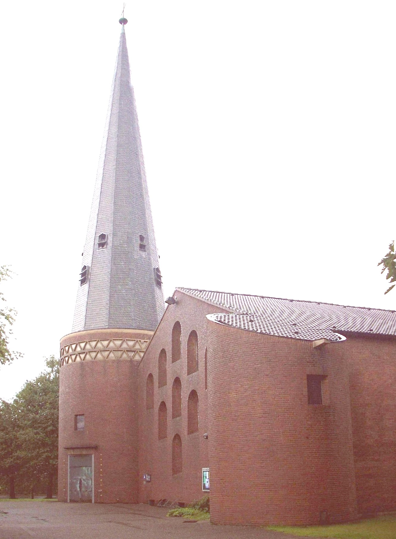 Ev. Lukaskirche Münster, southwest